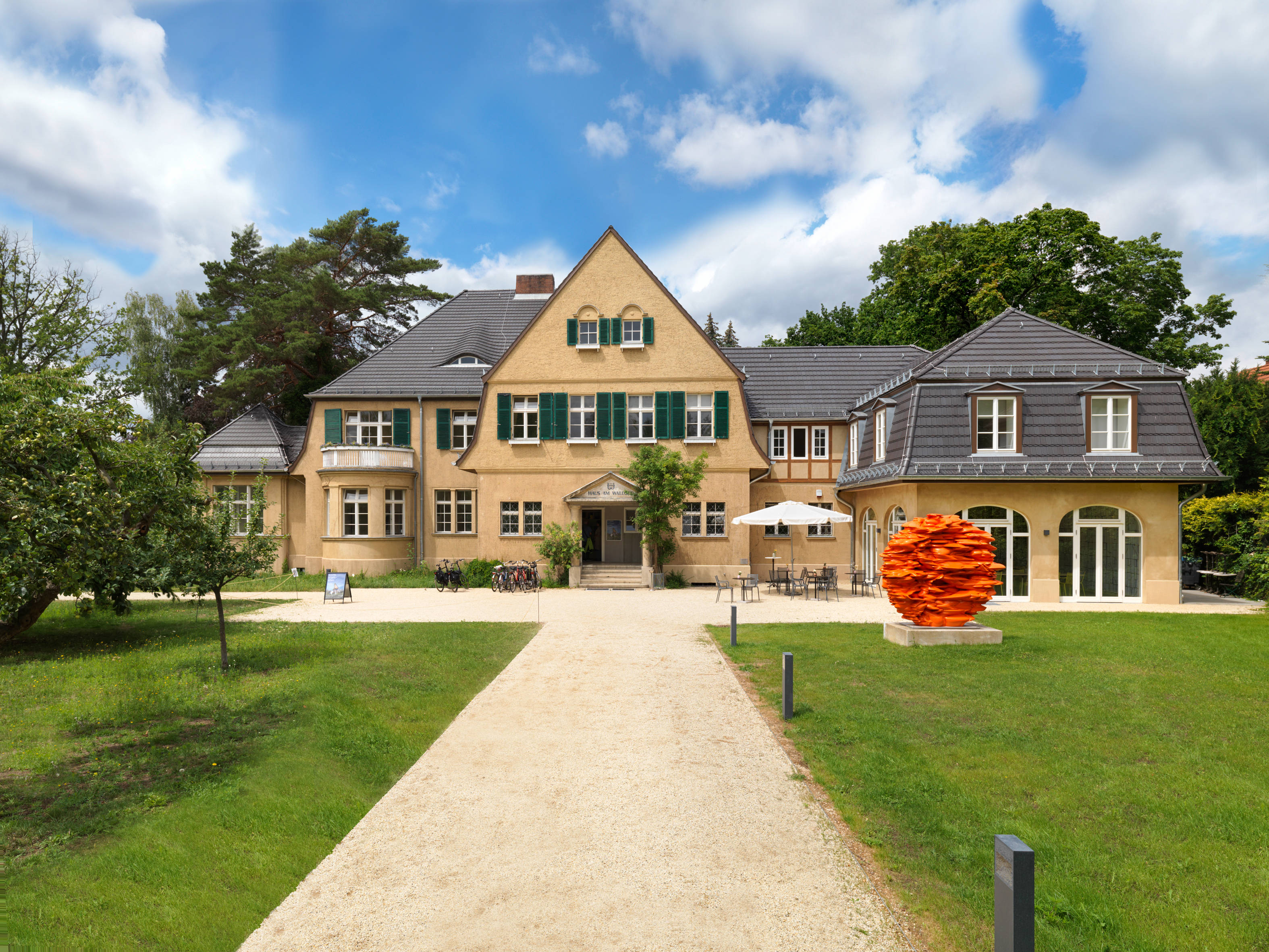 Haus am Waldsee - Internationale Kunst in Berlin, 2019, Foto Bernd Borchardt